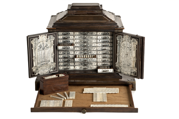 Ábaco neperiano (Barroco). Número de inventario: 52698.